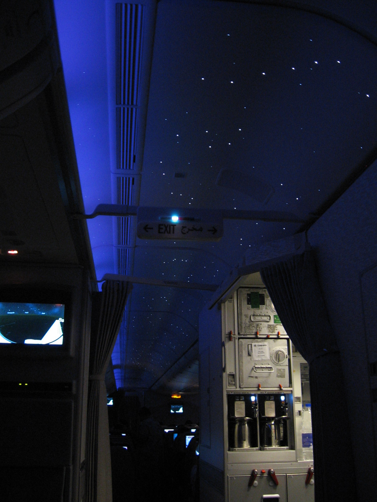 EK 777